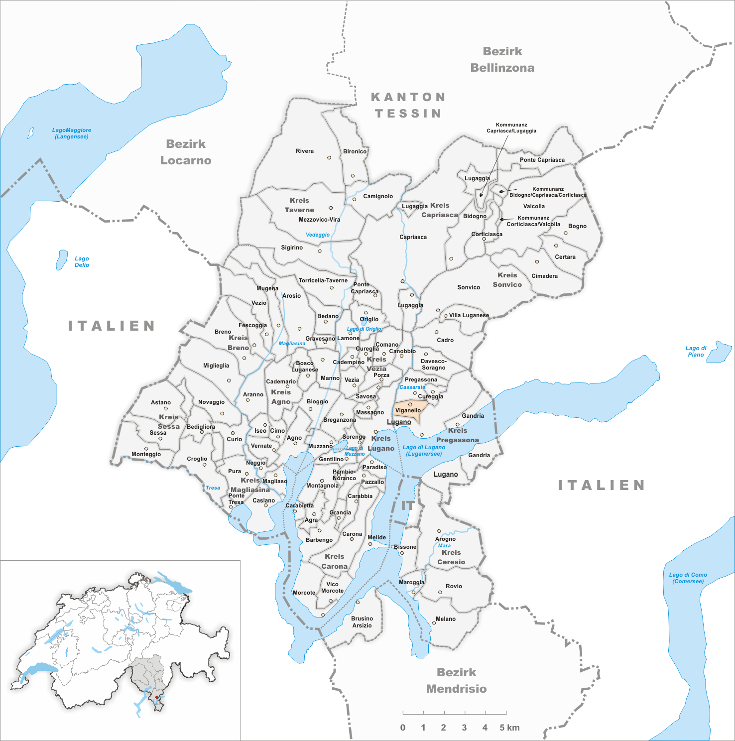 Municipality Viganello Artist: Tschubby